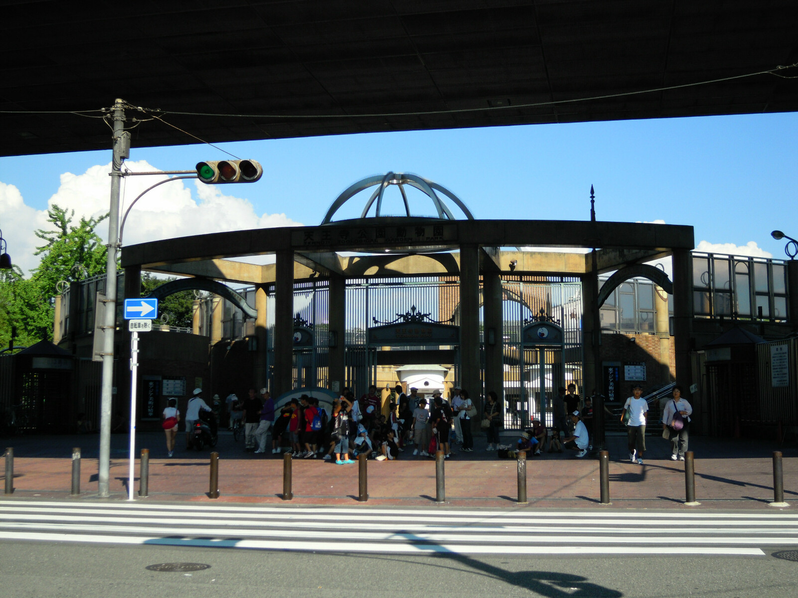 TENNOJI ZOO